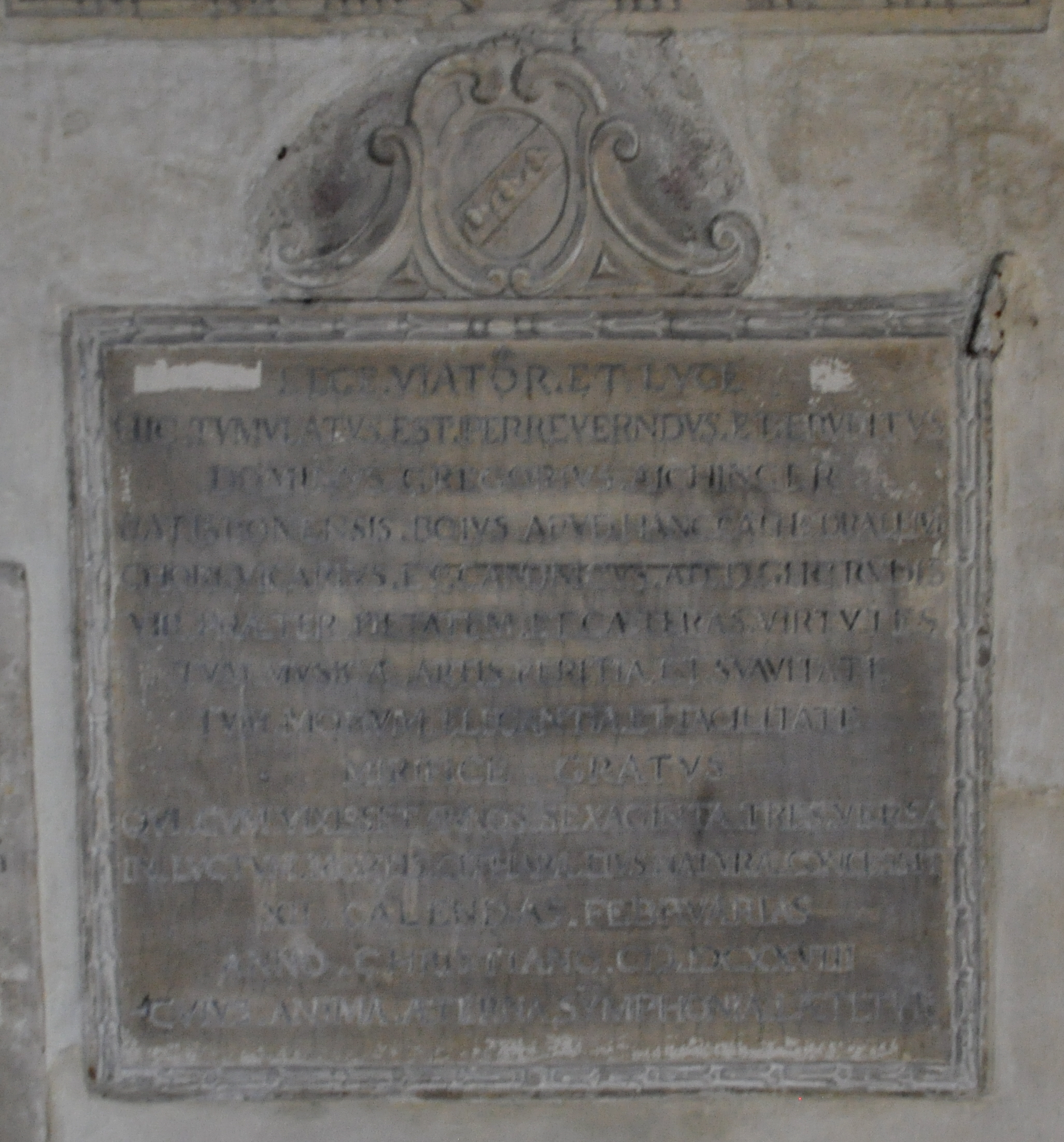 Augsburg, Dom, Kreuzgang, Nordflügel, 8. Joch, Epitaph für Gregor Aichinger (* 1564; † 21. Januar 1628), Domkapellmeister und Komponist; Kosel Nr. 232; Solnhofener Stein; Inschrift mit Wappen